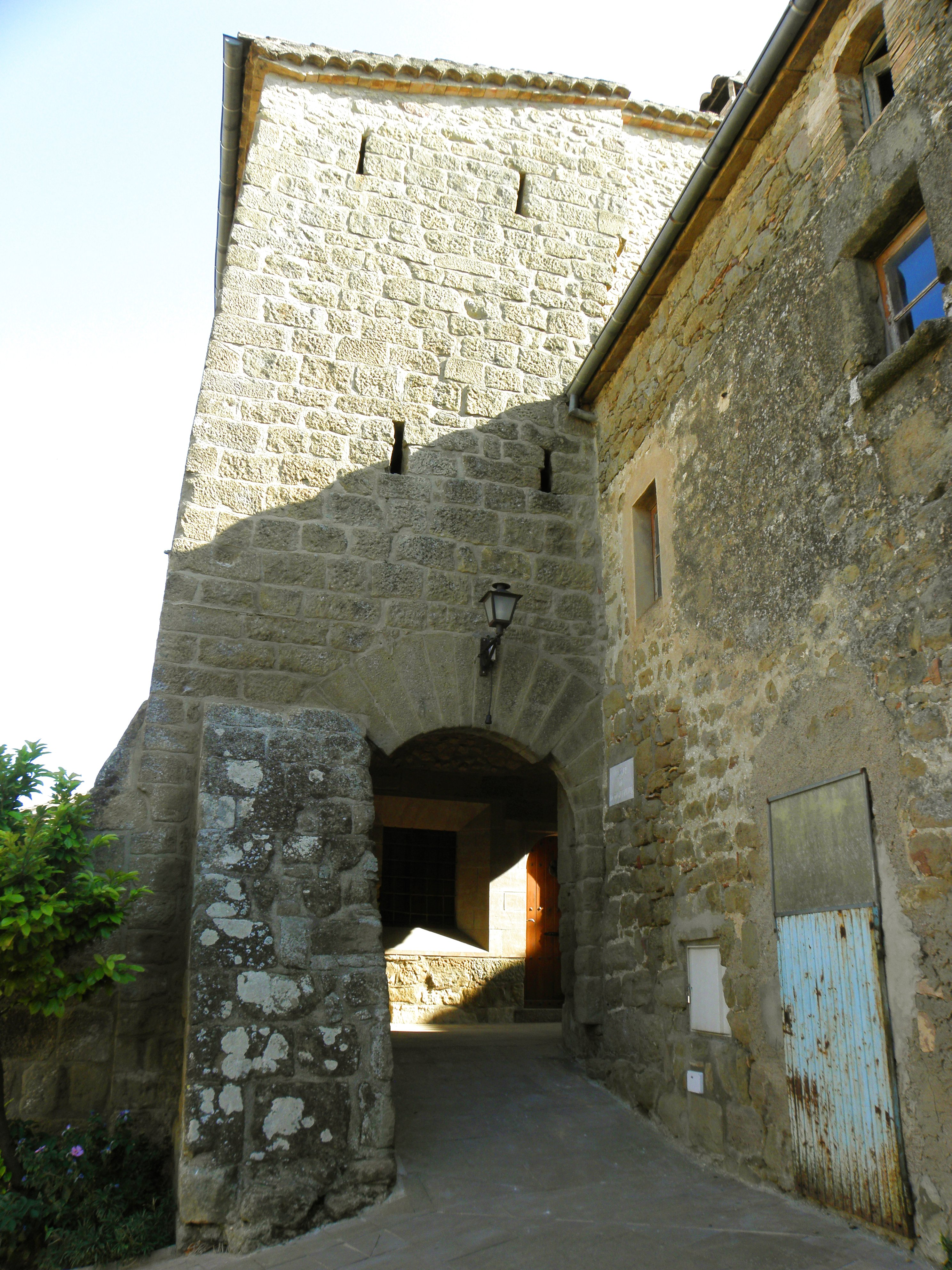 El castell de Sant Climenç, al municipi de Pinell de Solsonès, amb el portal d'accés a la vila closa.